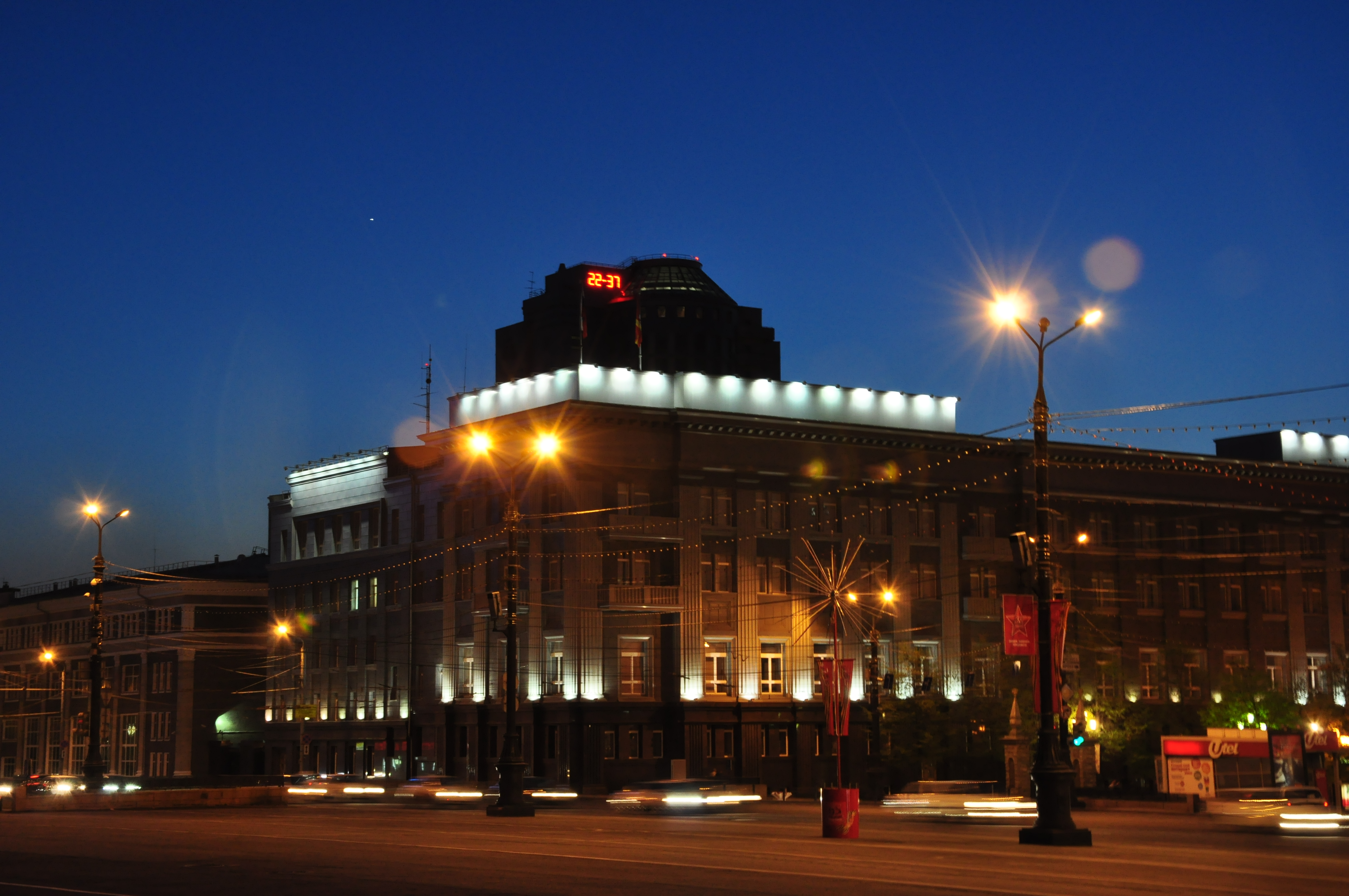 здание Законодательного Собрания Челябинской области